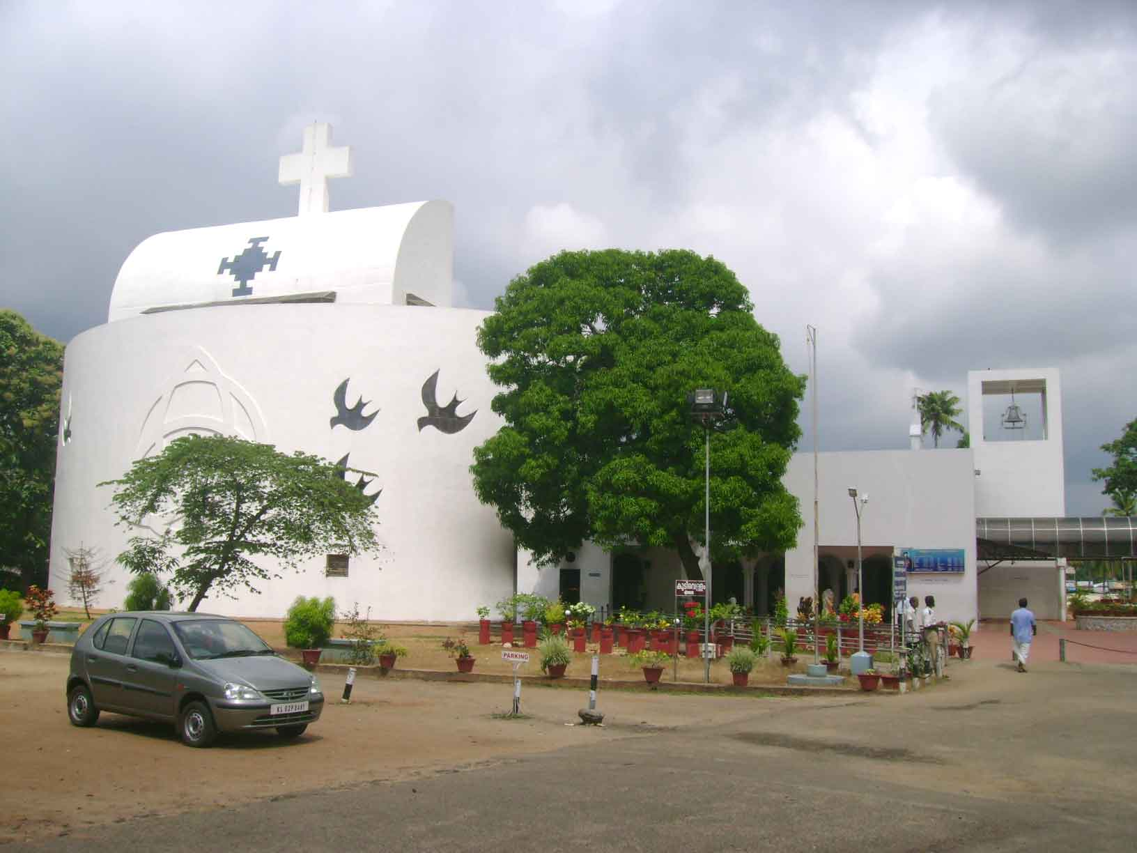 പരുമലപള്ളിയുടെ മുൻ വശത്തുനിന്നുള്ള കാഴ്ച